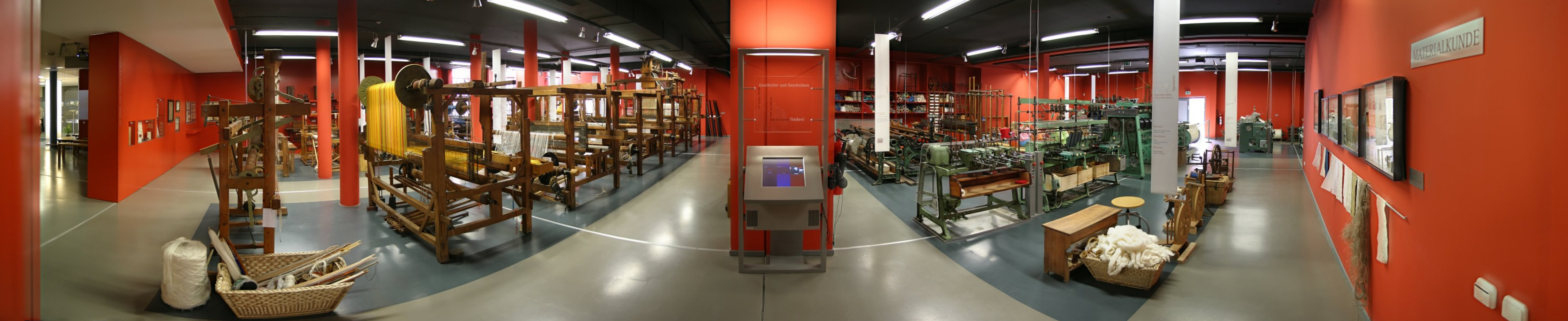 Web MUSEUM OEDERAN Panorama